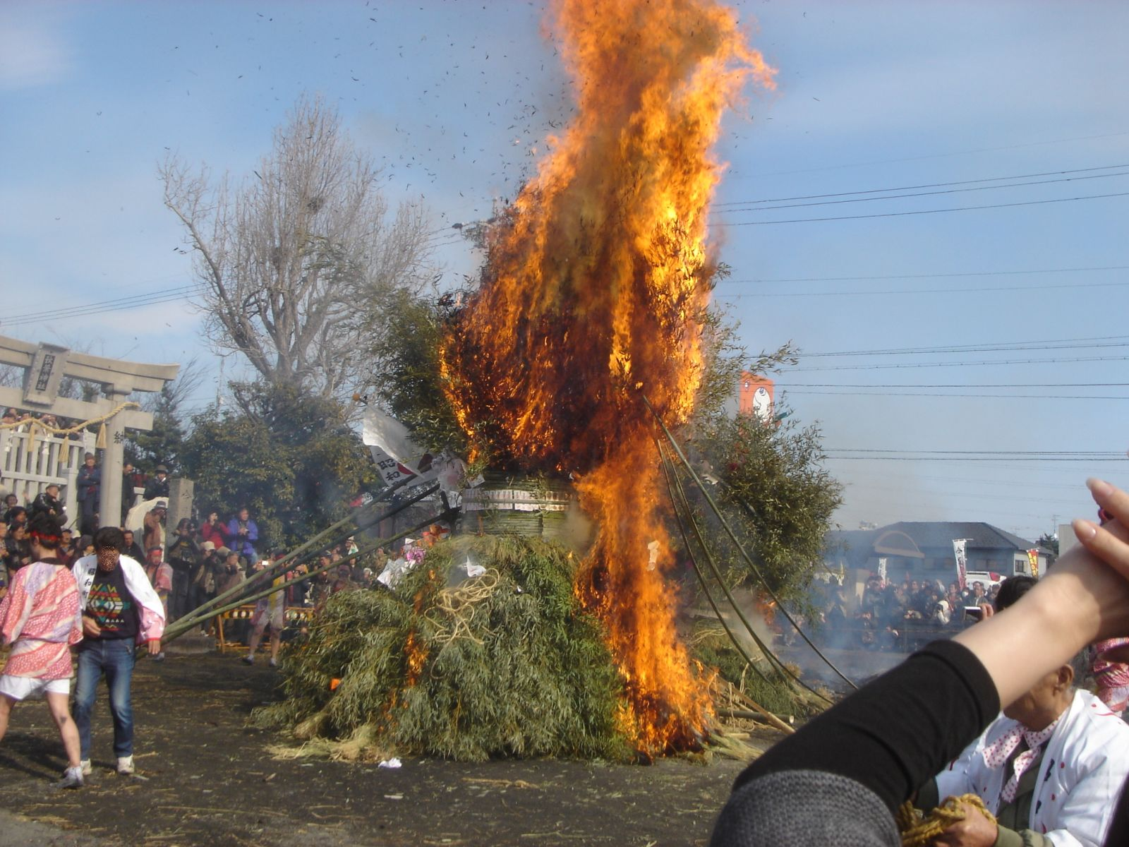 Imao-no-sagicho in kaizu city(今尾の左義長),Kaizu,Gifu,Japan(岐阜県海津市今尾,秋葉神社)で撮影。